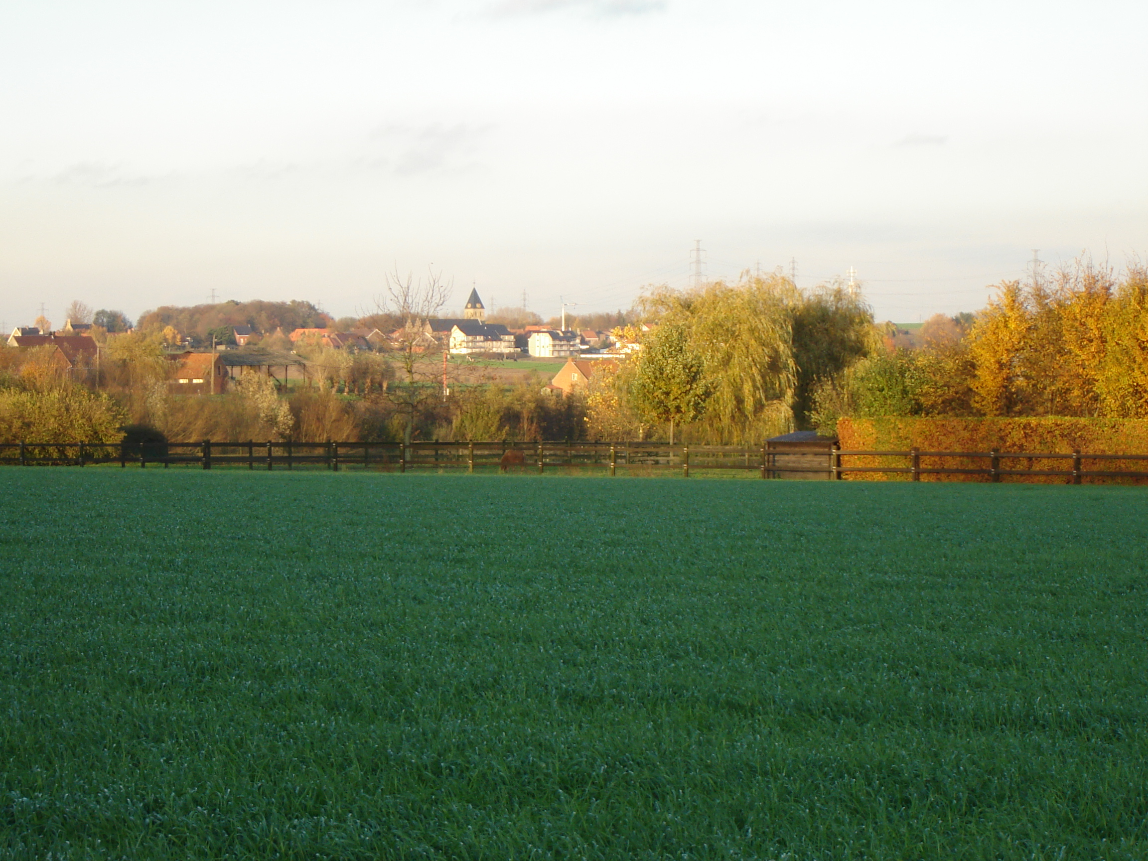 Village of Anzegem, as seen from the Tiegemberg, West-Flanders, Belgium